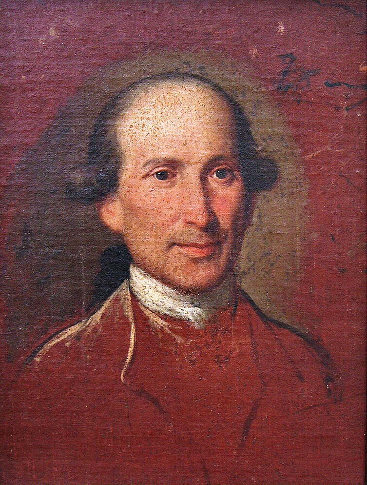 Foto del quadro con soggetto il ritratto del Barone Antonio Maghella